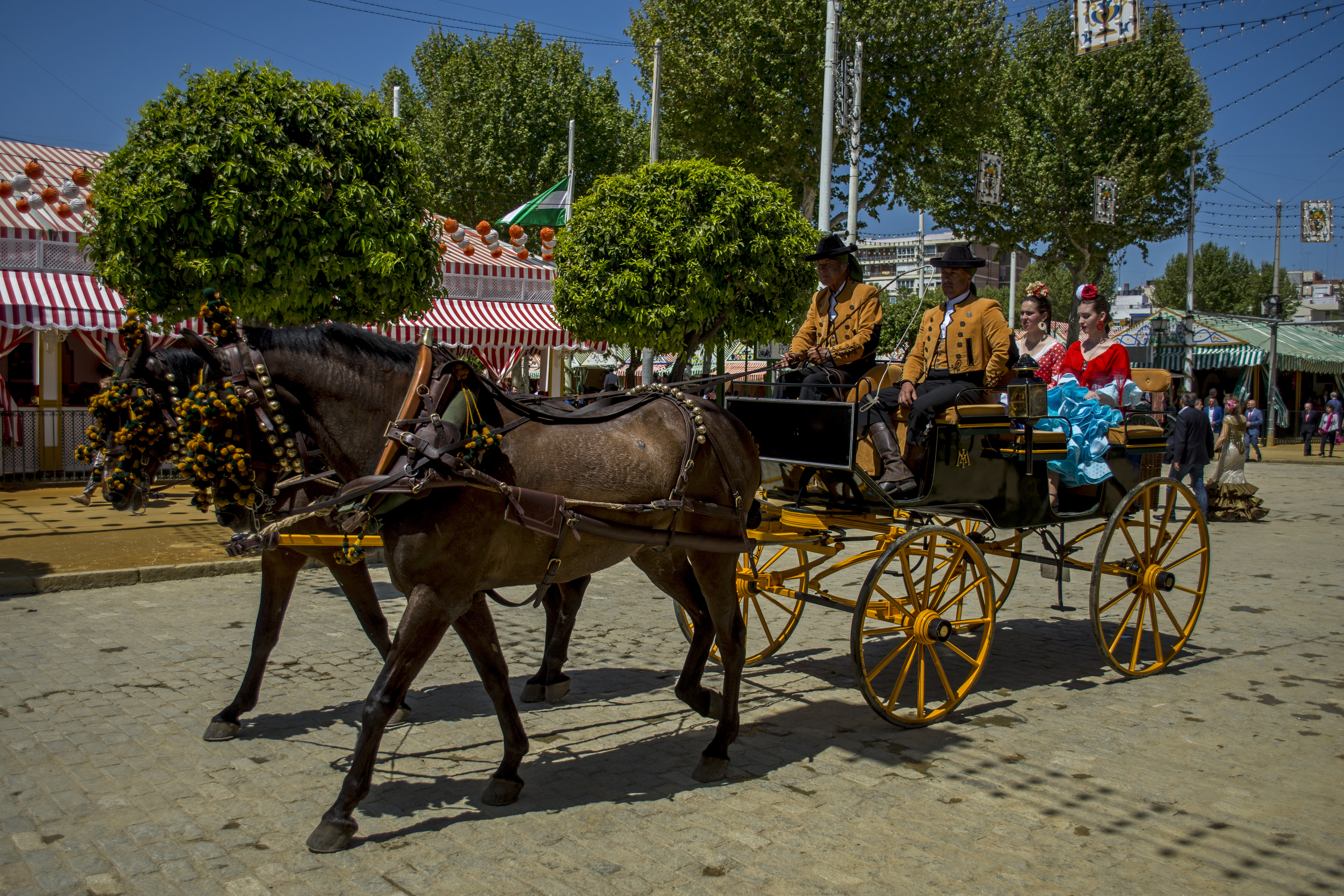 Feria de abril de Sevilla, 2018.